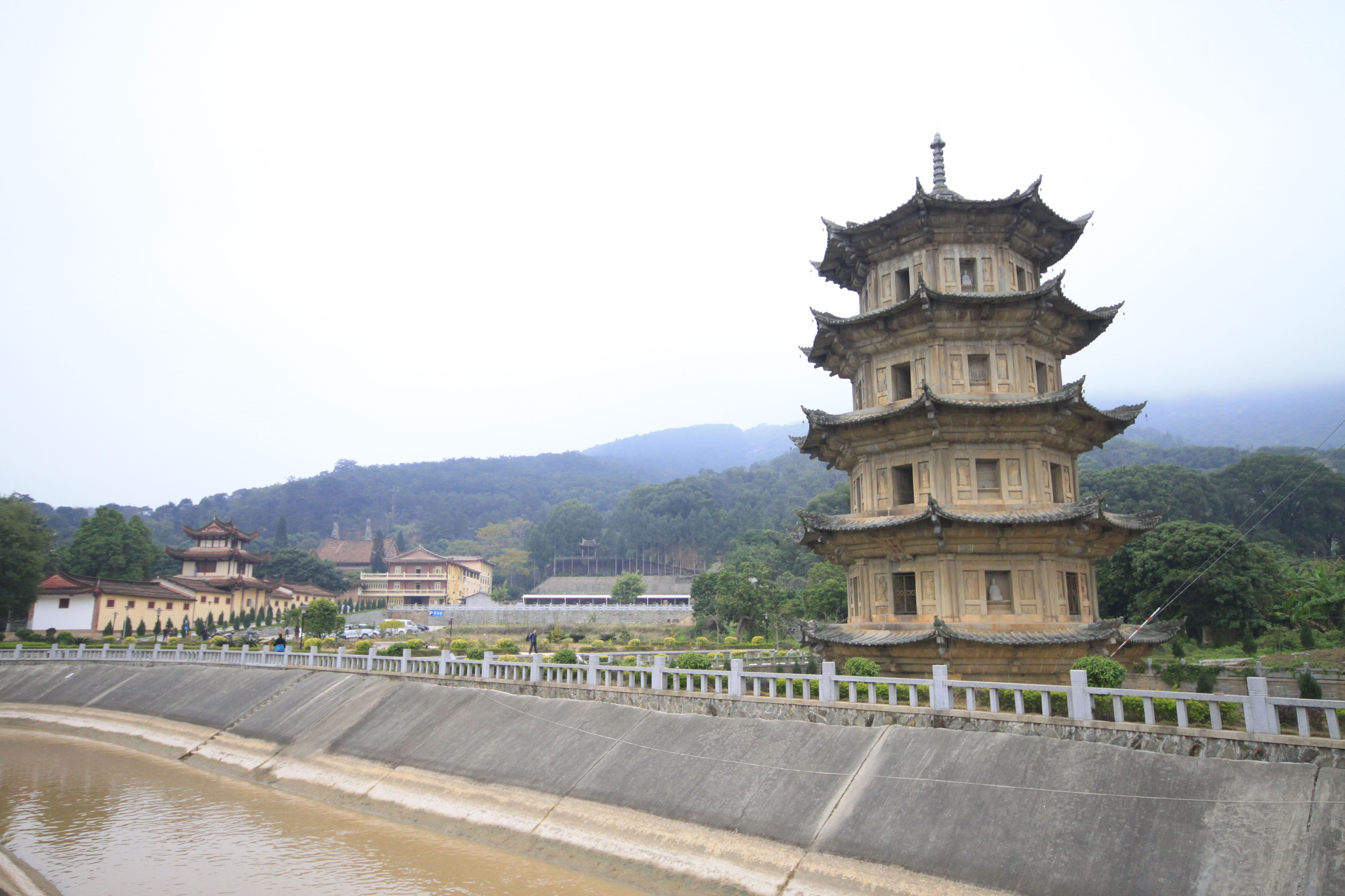 广化寺释迦文佛塔，位于中国福建省莆田市，是全国重点文物保护单位。